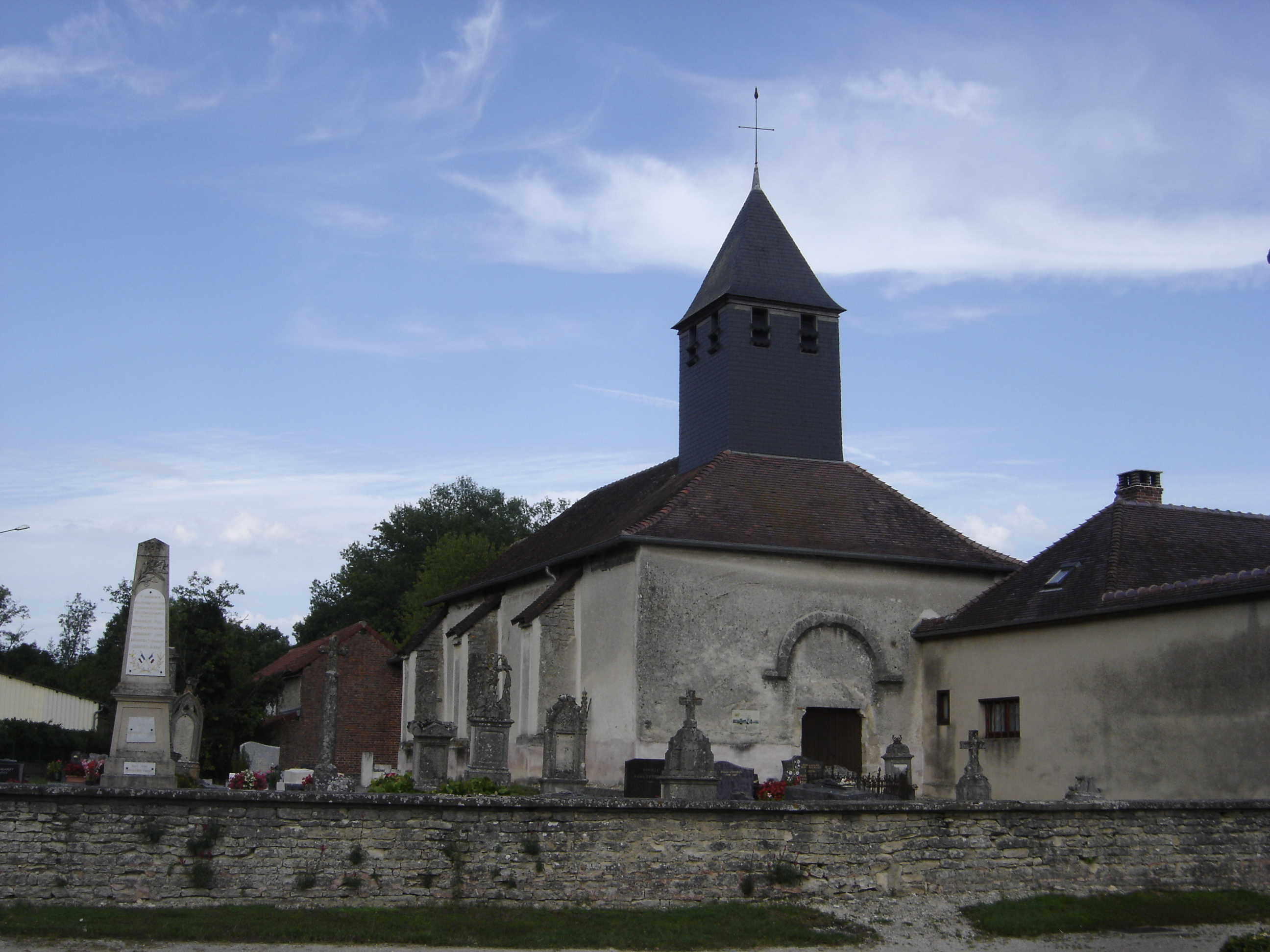 église Saint Gengoul de Juvanzé - Aube - France